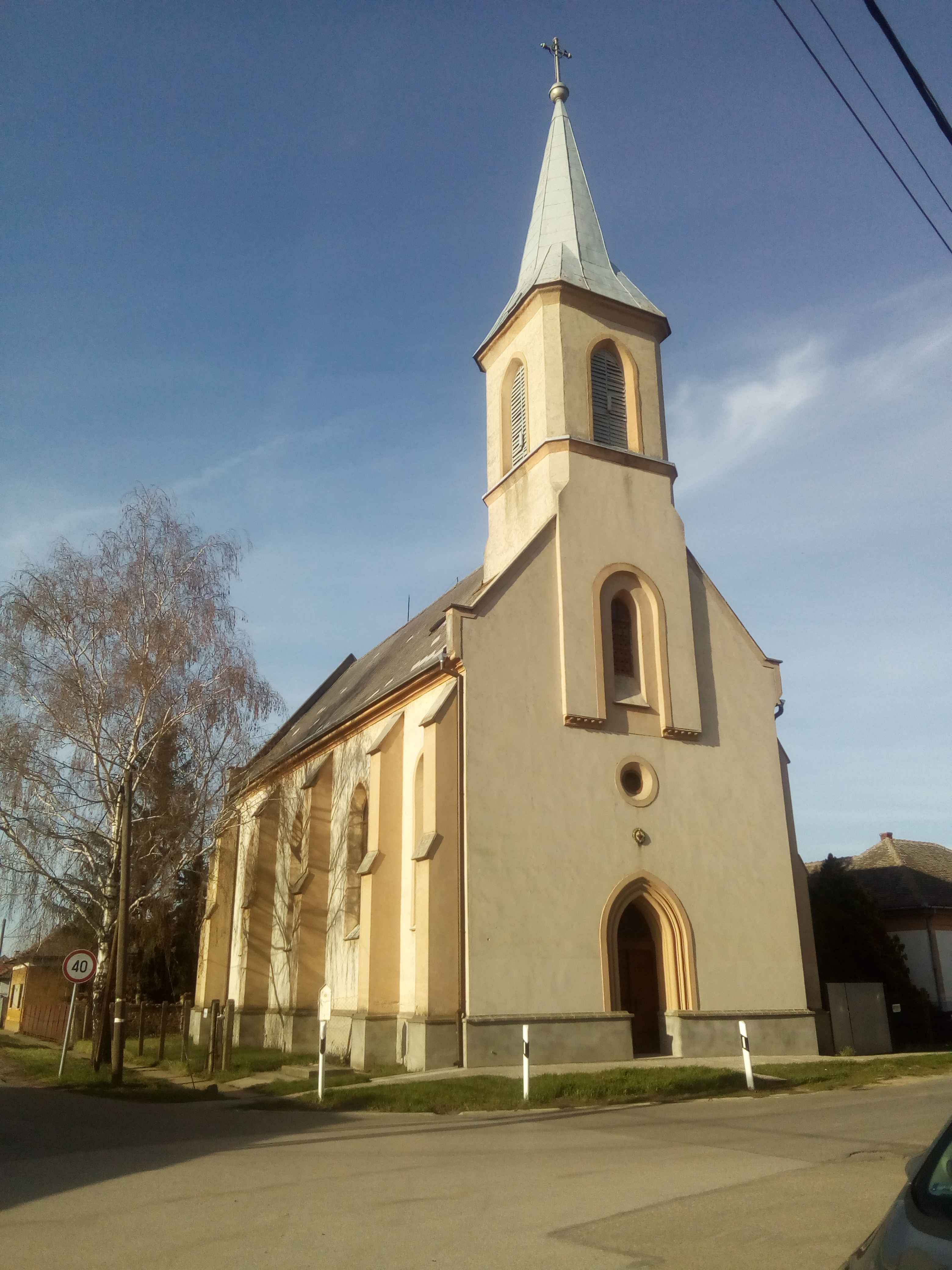 Szent László katolikus templom Szentetornya